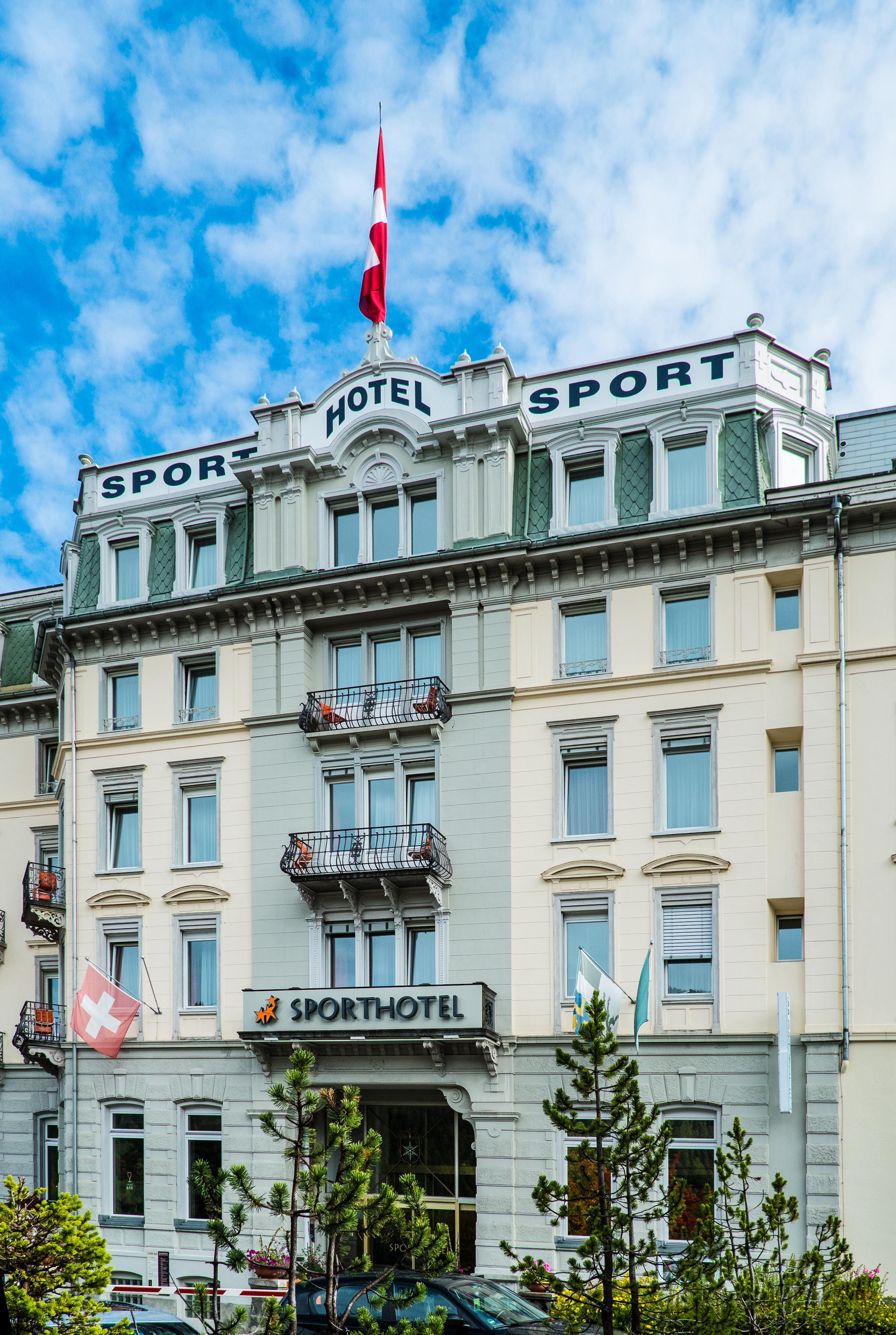 Pontresina - Sporthotel, Mitteltrakt